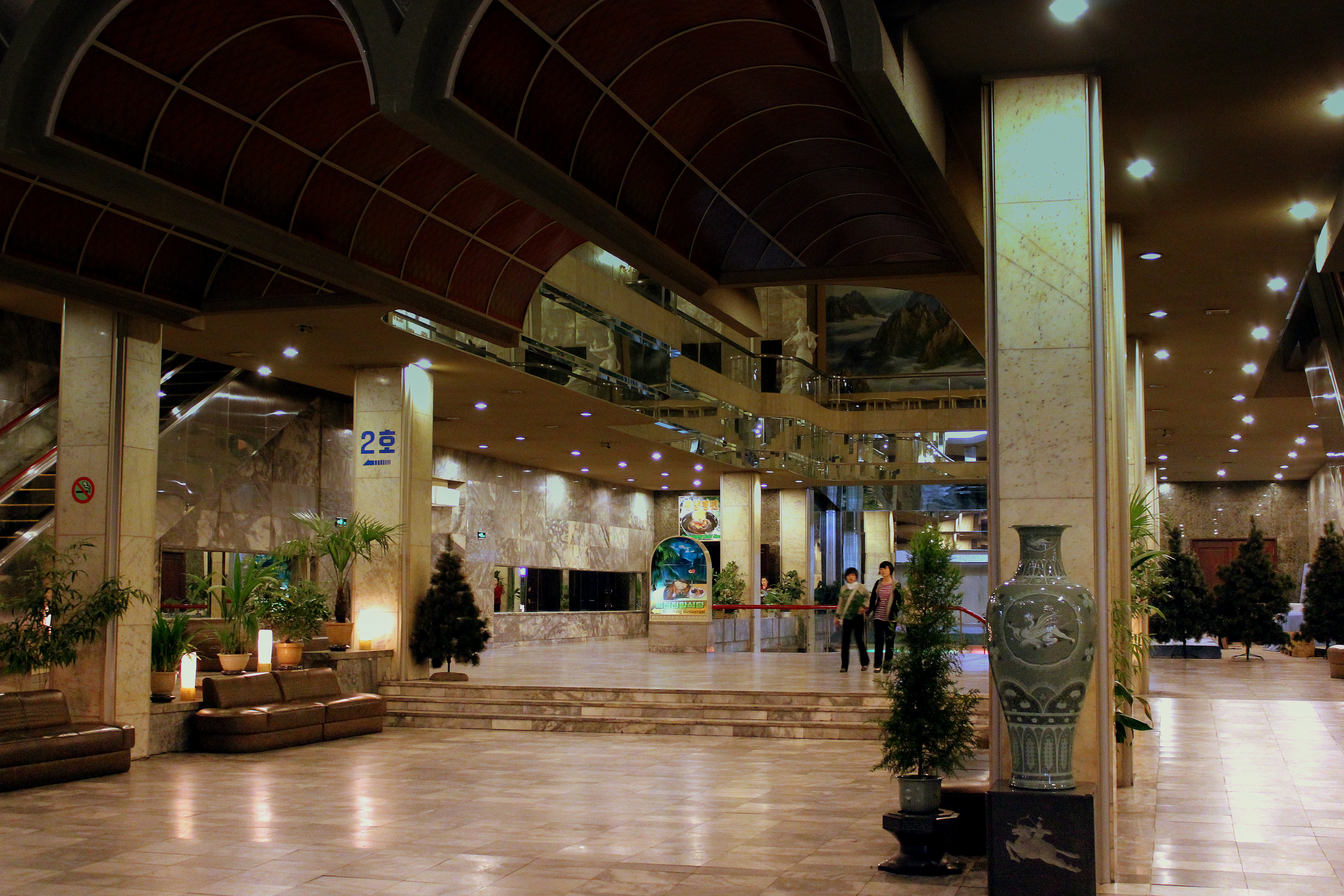 KORYO HOTEL PYONGYANG CITY DPRK NORTH KOREA OCT 2012